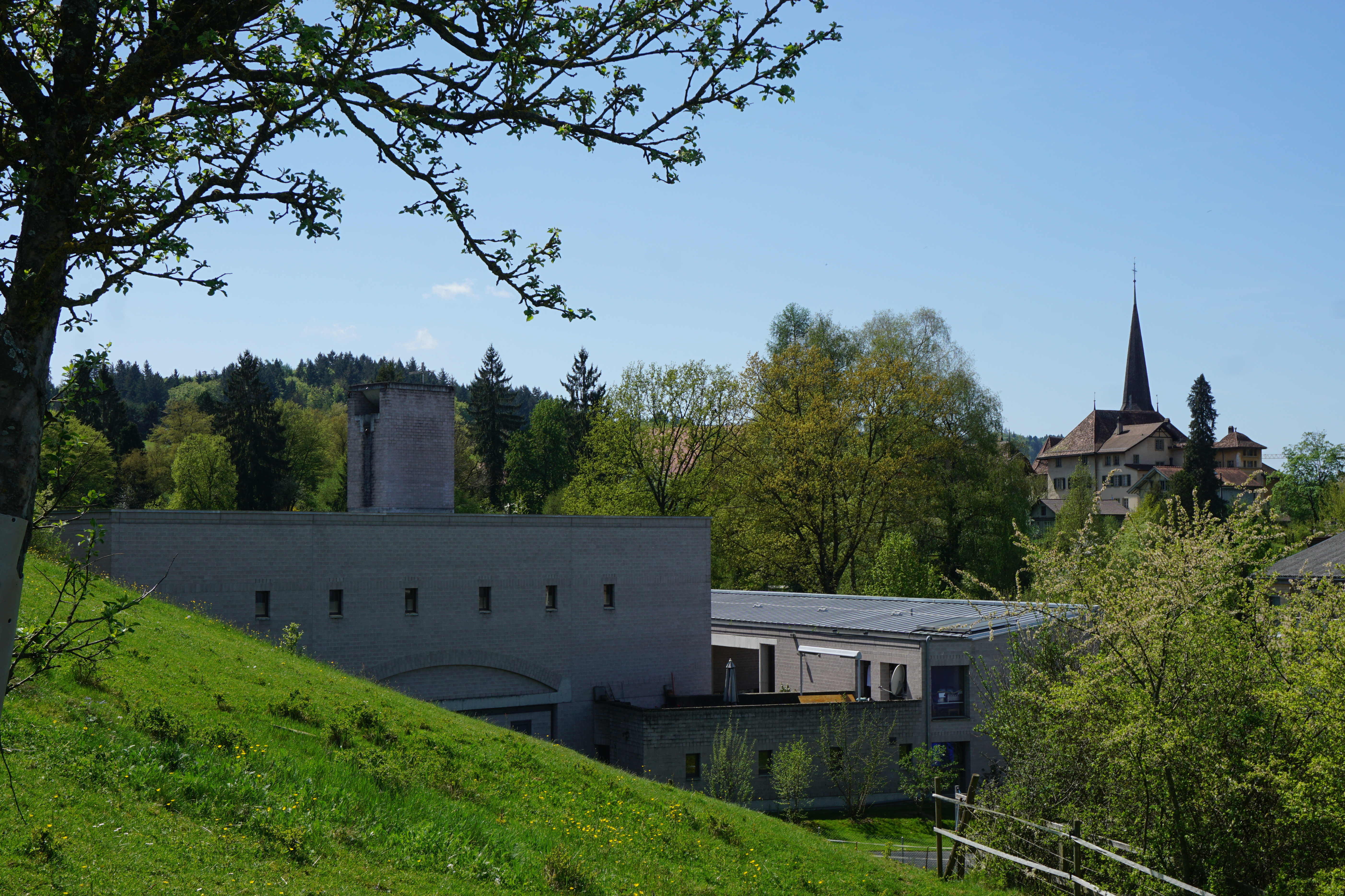 Ansicht der Kirche St. Josef vom Weidweg mit Schloss Köniz im Hintergrund